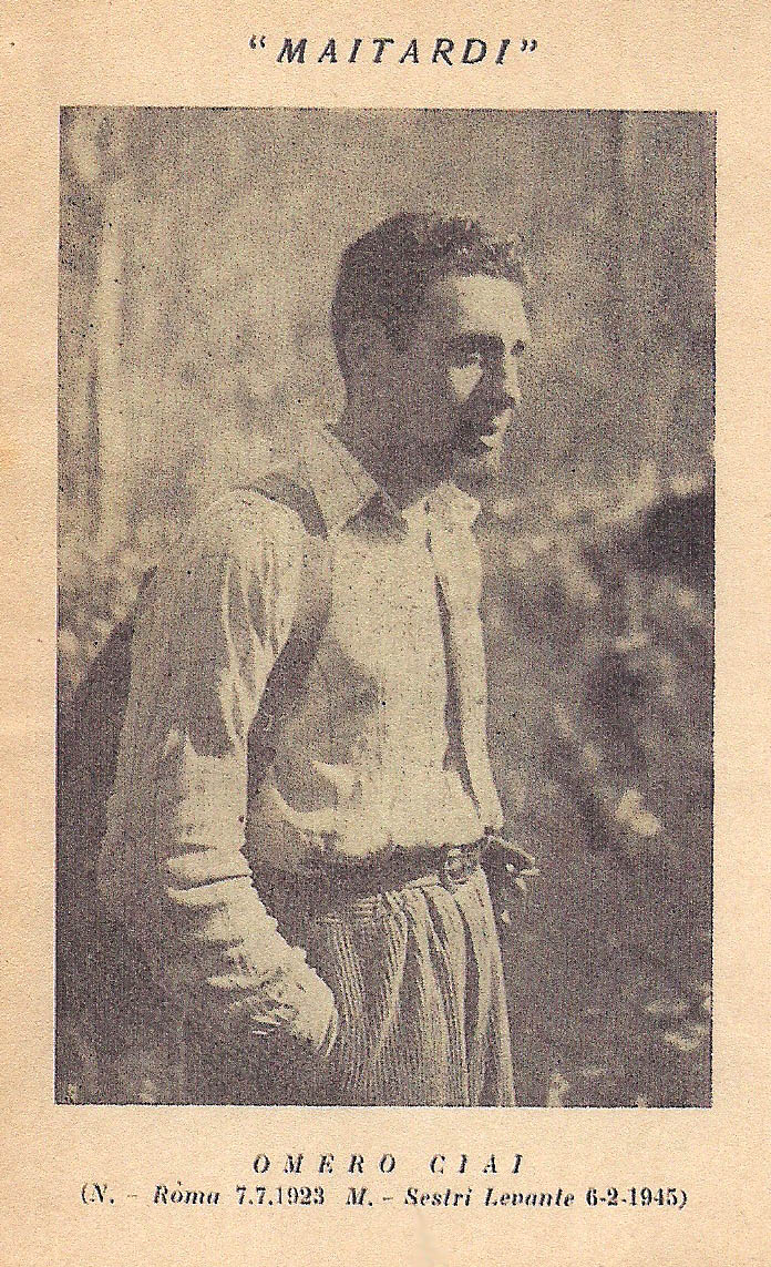 Foto di Omero Ciai (Maitardi) nel 1942 circa, durante una spedizione alpinistica